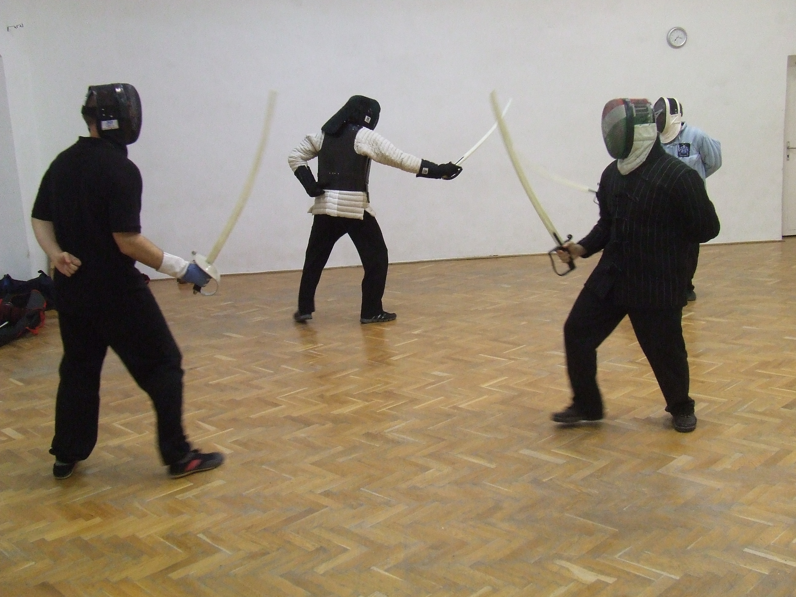 Edzés